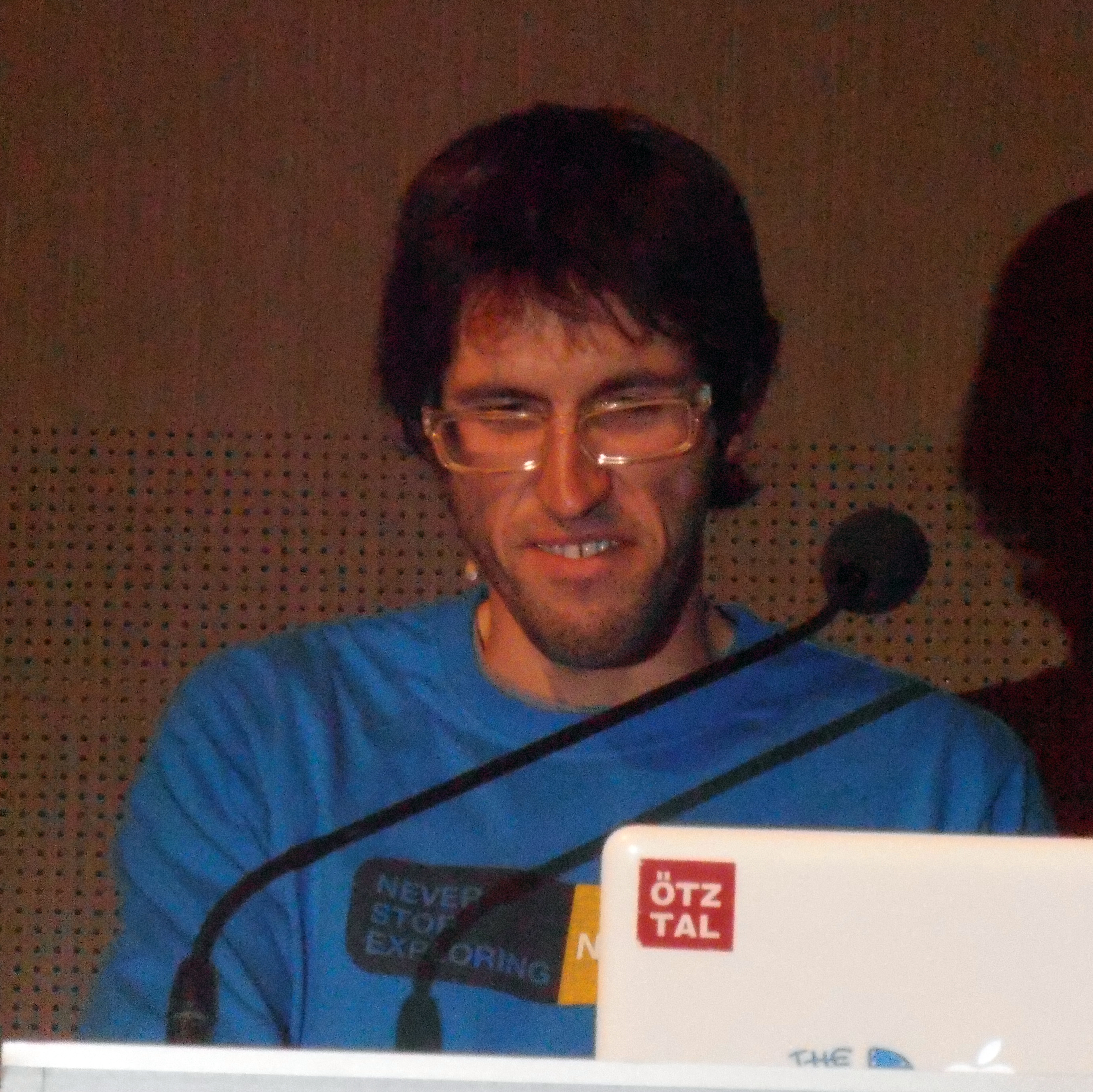 Hansjörg Auer, Alpinmesse Innsbruck 2012